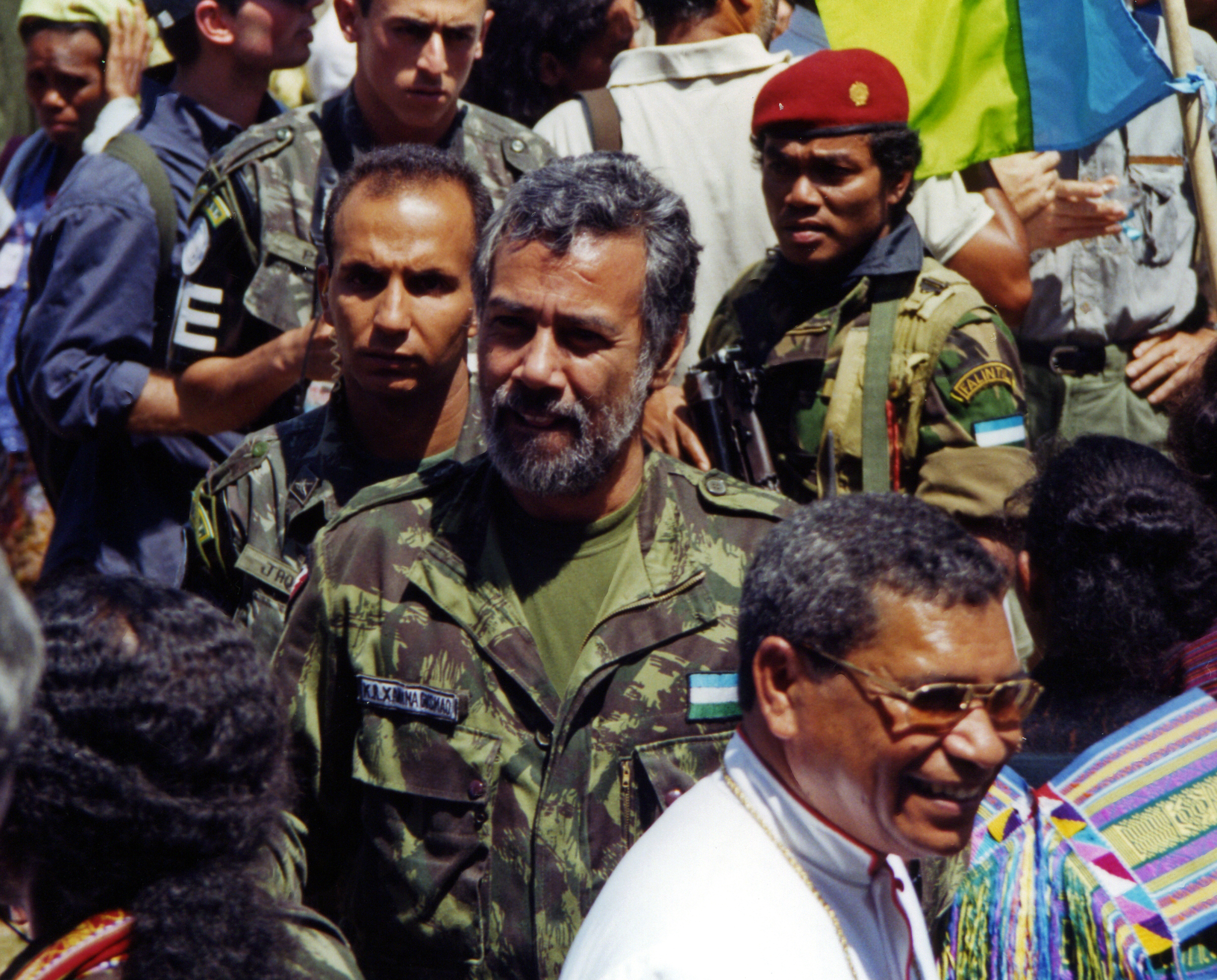 Xanana Gusmão trifft in Aileu nach seiner Freilassung aus indonesischer Gefangenschaft im Oktober 1999 auf seine Kameraden von der FALINTIL.